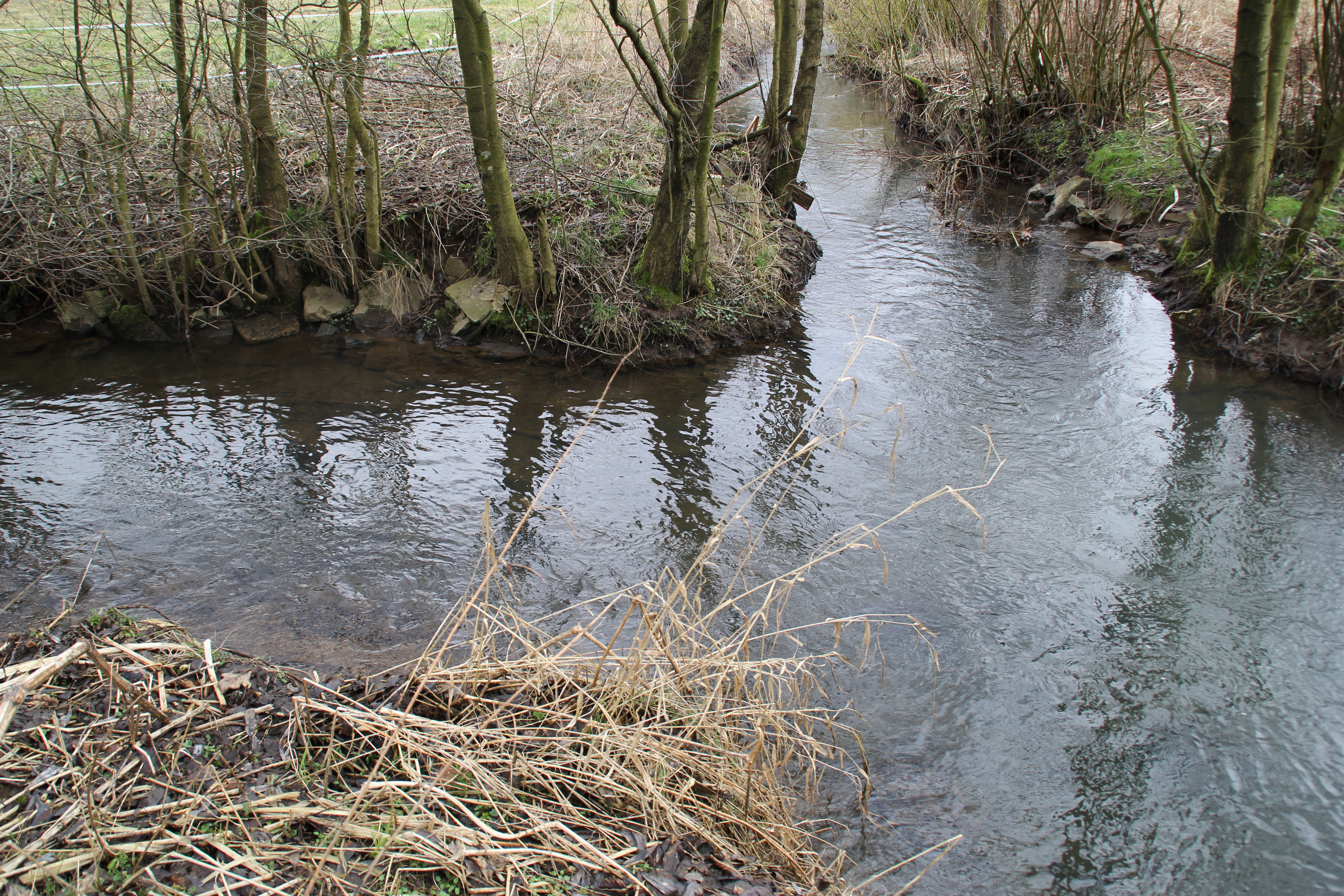 Der Zusammenfluss der Quellbäche des Flusses Salz. Links der von Hartmannshain herabfließende Salzbach, rechts der durch den Ort Salz fließende Salzbach.